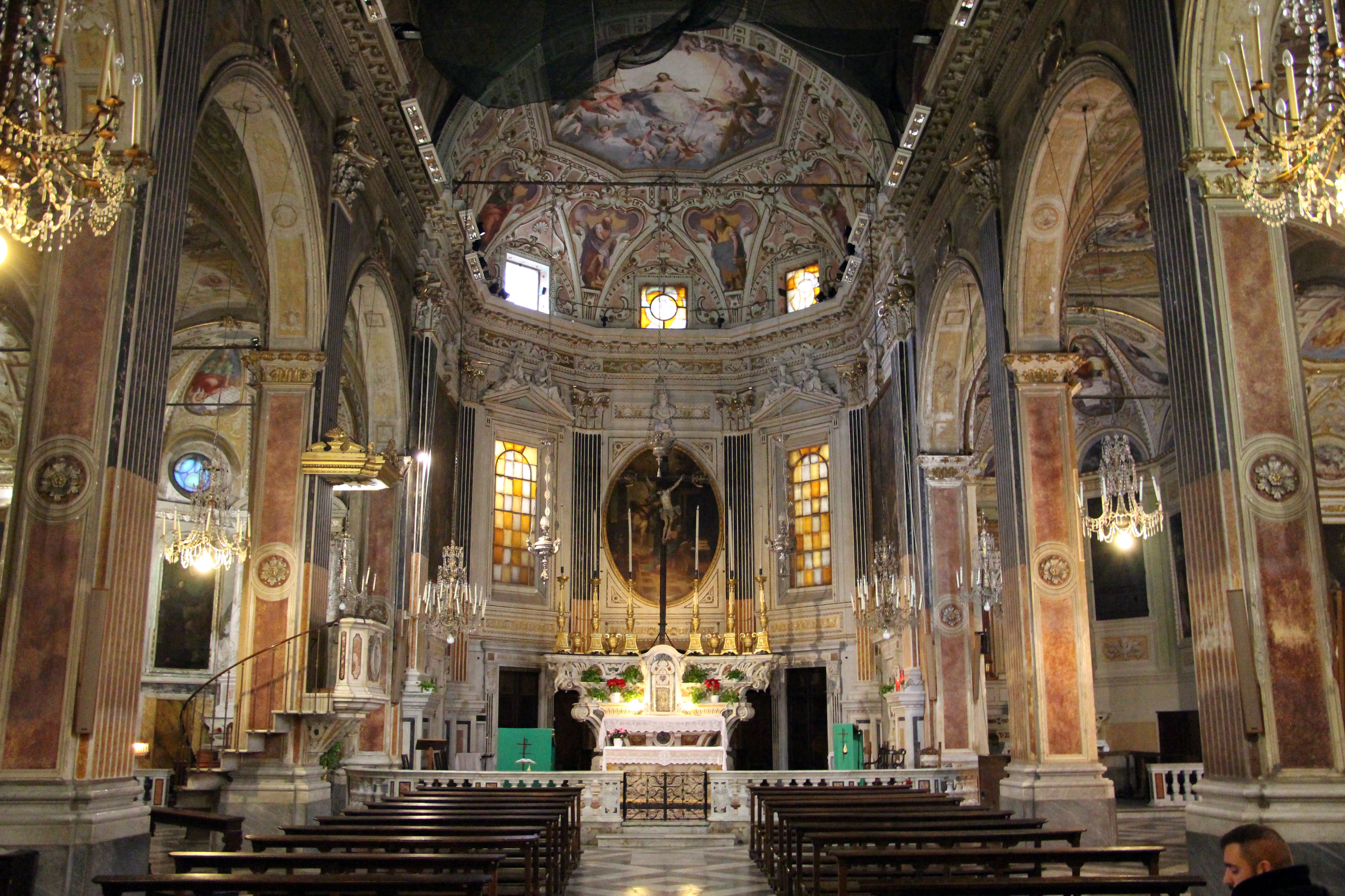 Santissima Annunziata di Portoria